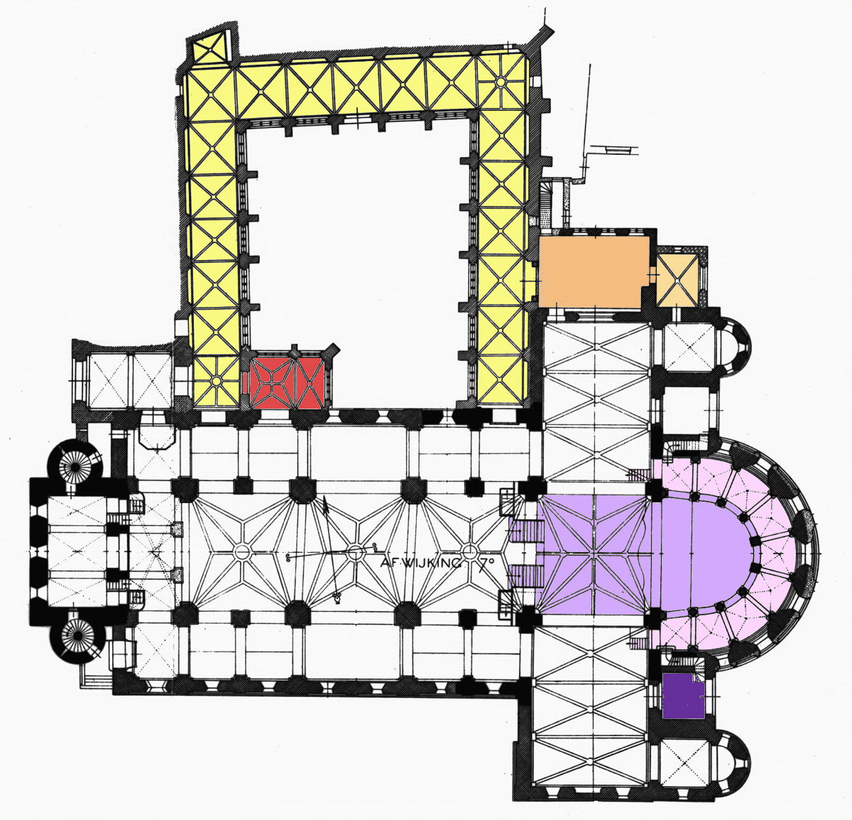 Plattegrond van de Onze-Lieve-Vrouwebasiliek in Maastricht. In kleur de delen van de kerk voorbehouden aan de kanunniken en andere leden van het kapittel van Onze Lieve Vrouwe. Violet en roze: het priesterkoor en de kooromgang, beide met trappen. Paars: de Sint-Barbaratoren, archief- en kerkschatbewaarplaats. Geel: kruis- of kloostergang. Oranje en oker: kapittelzaal en Sint-Annakapel. Rood: Merodekapel.